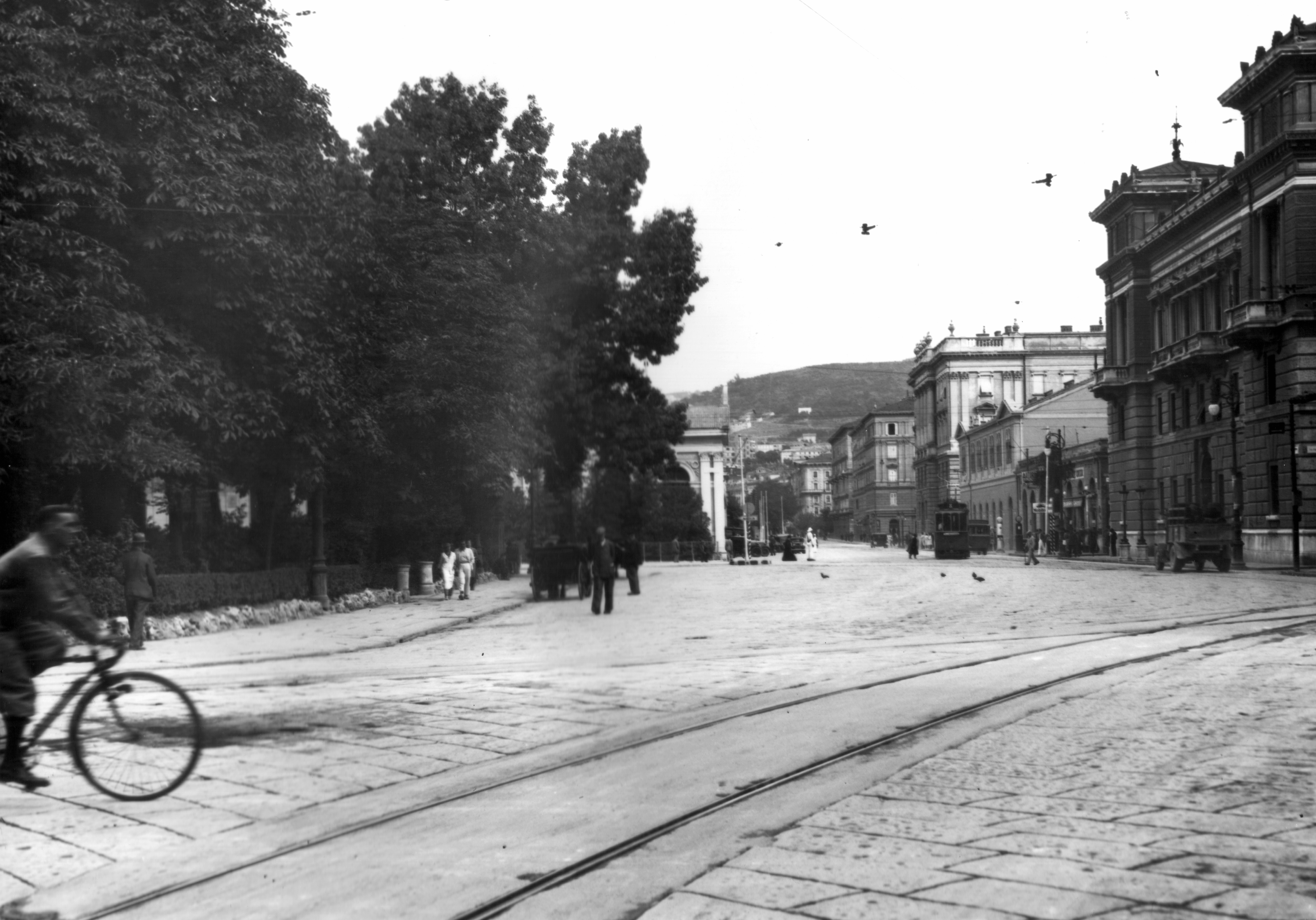 Piazza della Libertà a Viale Miramare felé nézve. Location: Italy, Trieste Tags: street view, genre painting, tram, bicycle Title: Piazza della Libertà a Viale Miramare felé nézve.